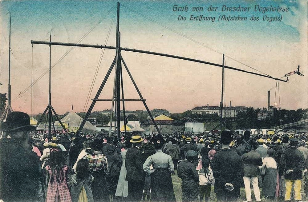 La pradera de pájaros era muy grande y muchos visitantes llegaron porque encontraron que esto era muy moderno. Aquí tienen que conocerse. También hubo muy pocos problemas. Menos que hoy.